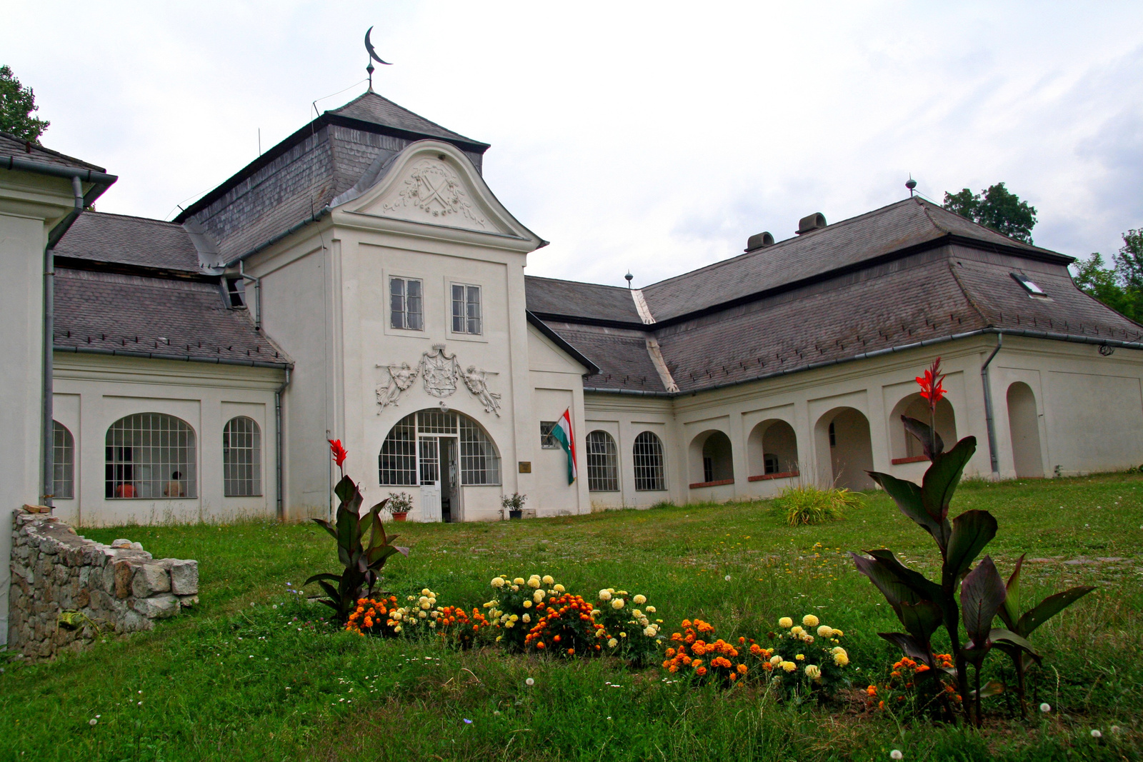 Fáy-kastély (Fáj, Bolt u. 1.) This is a photo of a monument in Hungary. Identifier: 2753